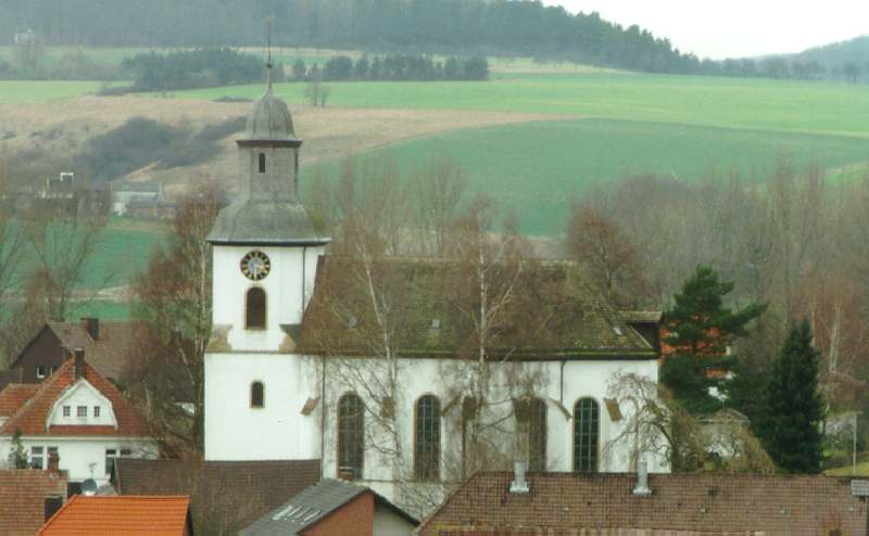 Pfarrkirche St. Katharina von der Borg aus gesehen, Rheder/Westf., Brakel, Kreis Höxter.